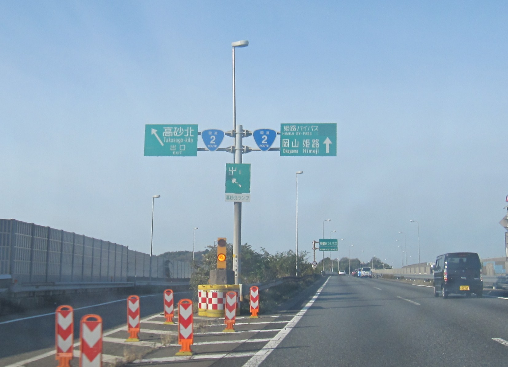 高砂北ランプ案内板